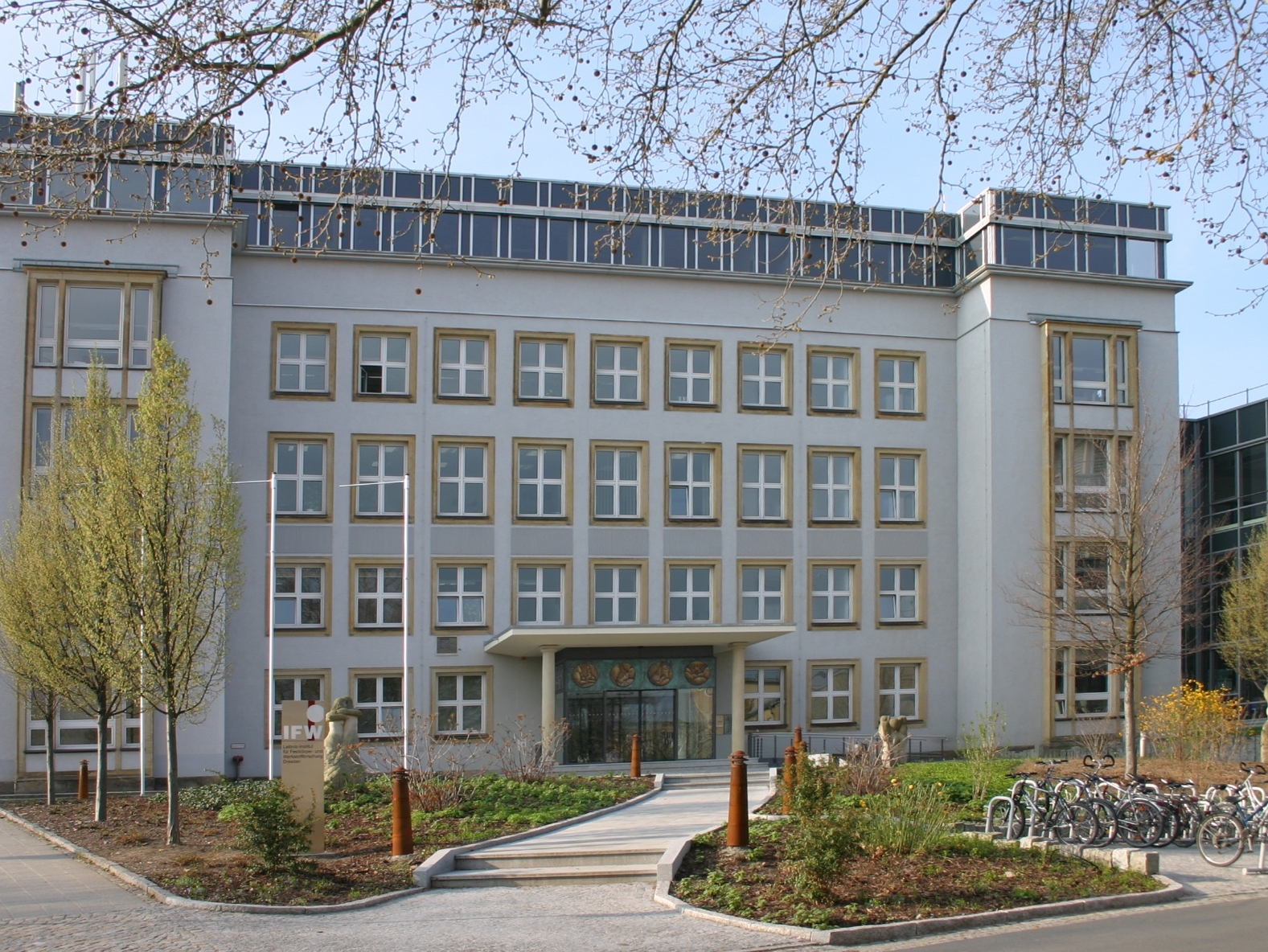 Foto des Institutsgebäudes des IFW Dresden, Blick auf den Haupteingang, Helmholtzstr.